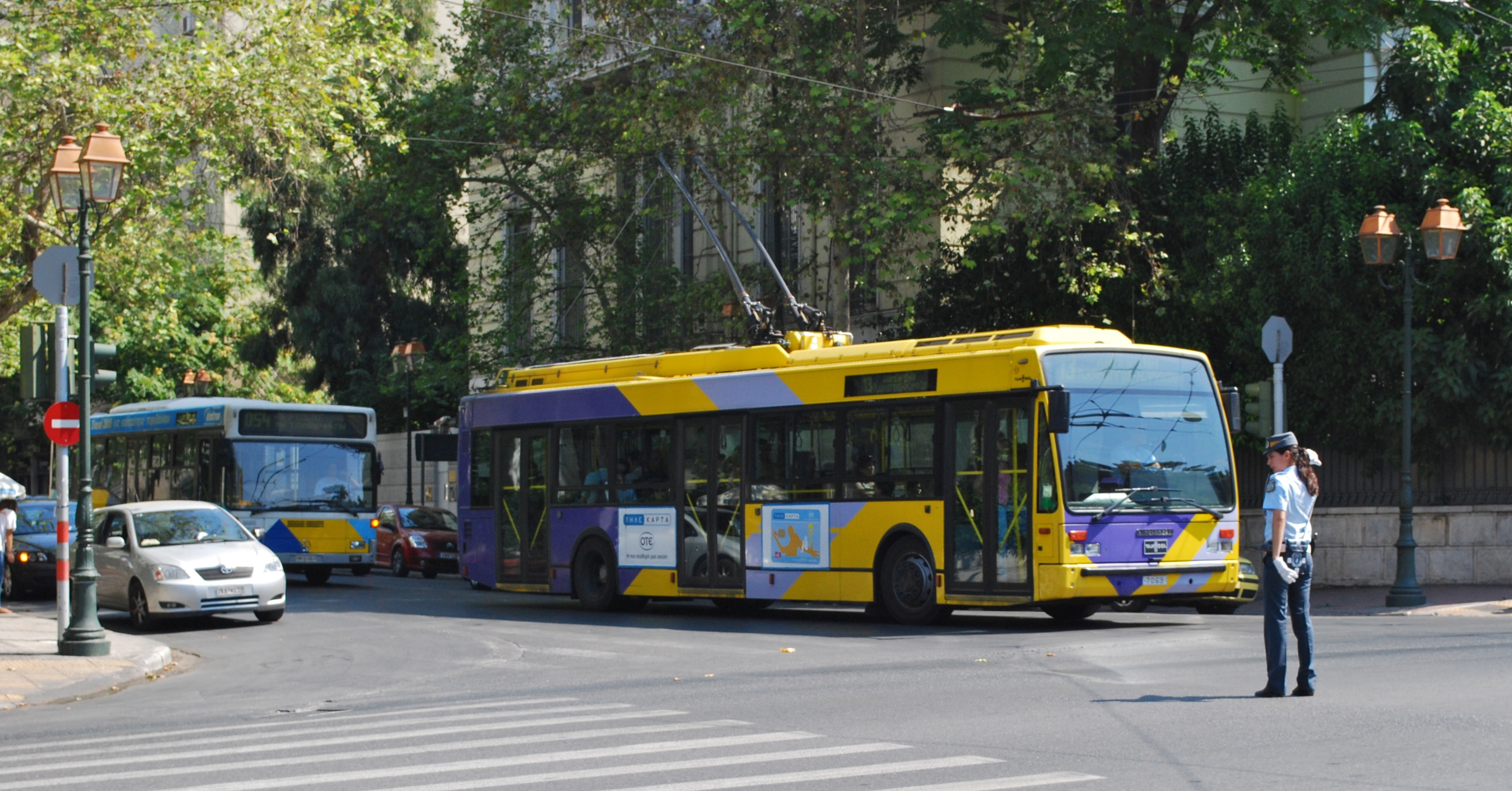 Vue de l'avenue de la Reine Sophie à Athènes.